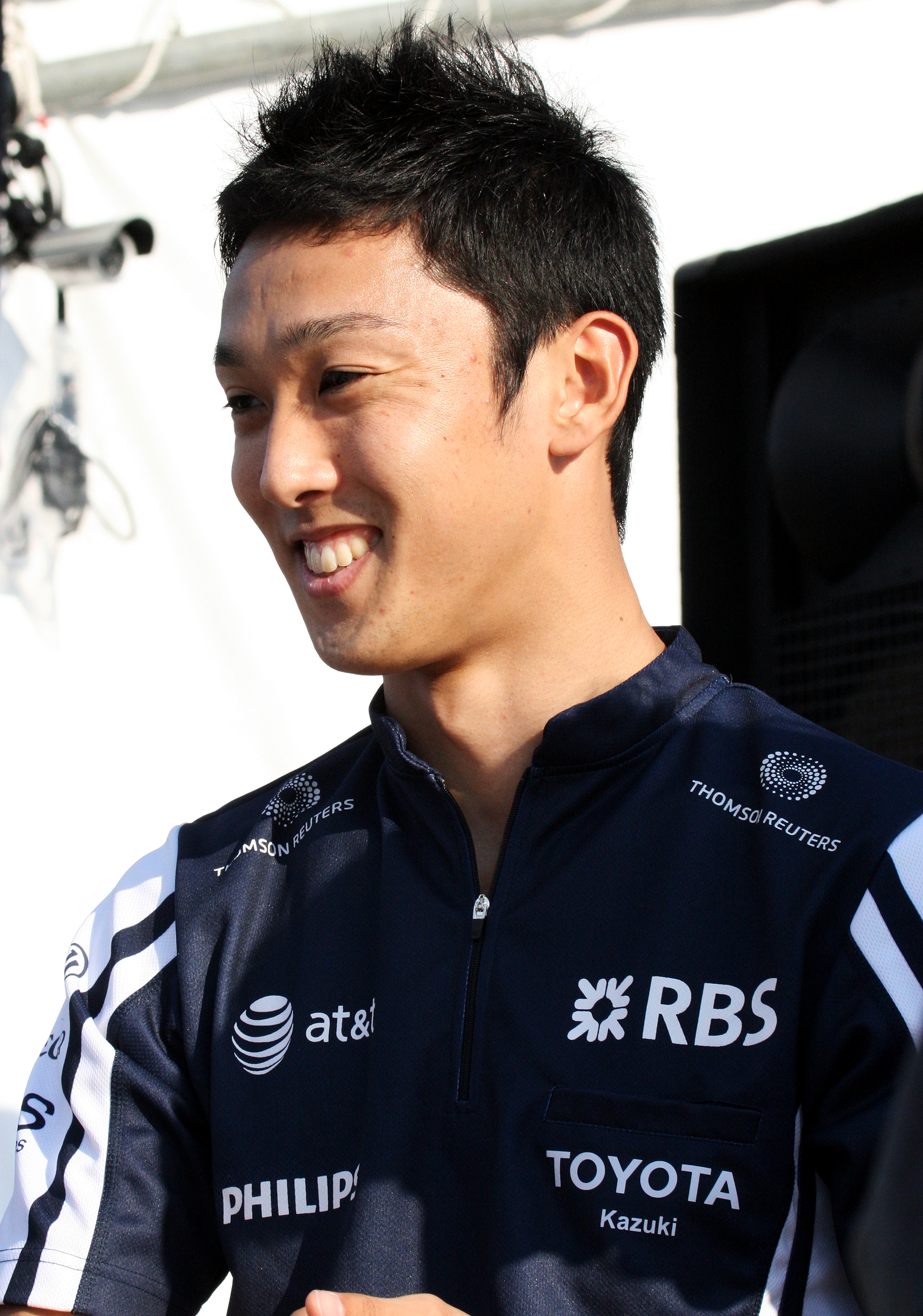 Motorsport Japan 2009: Kazuki Nakajima